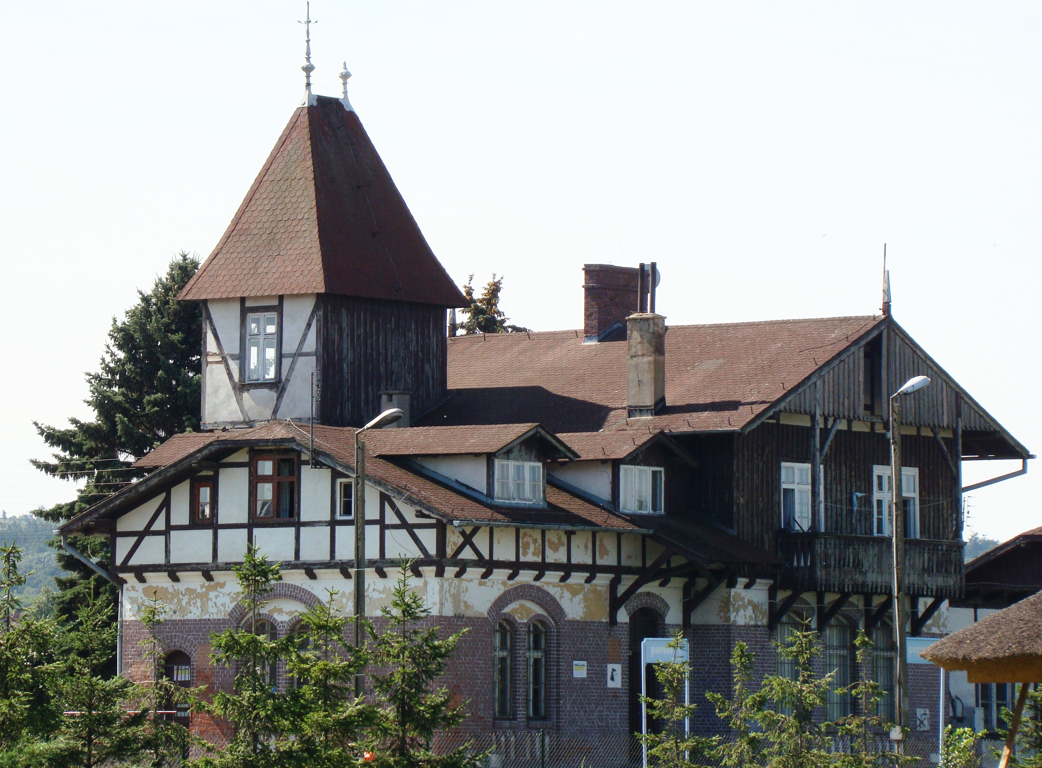 Tolkmicko - dworzec PKP